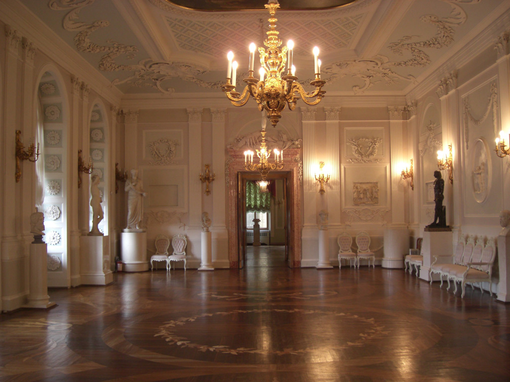 Белый зал в Большом Гатчинском дворце